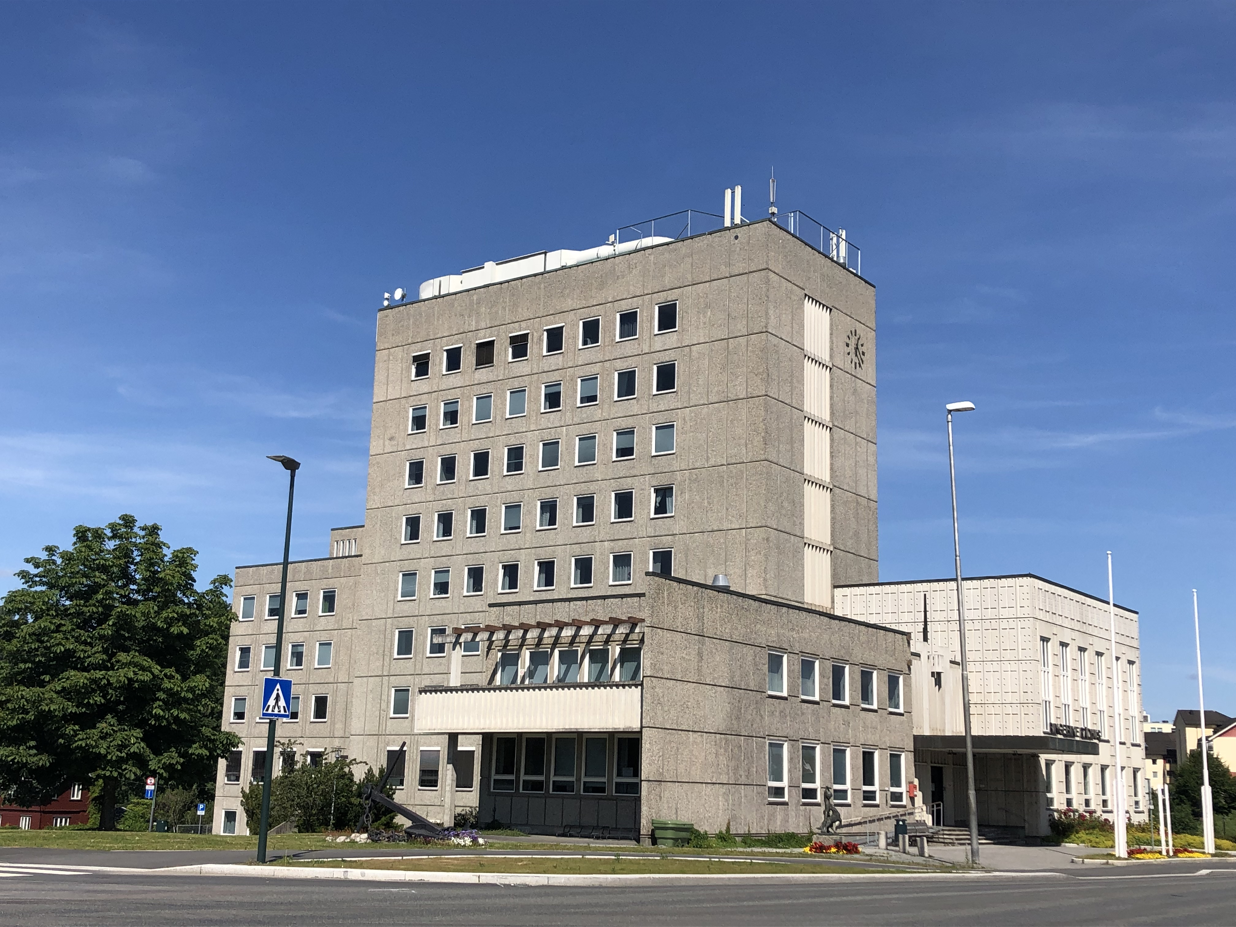 Ringerike rådhus i Hønefoss.